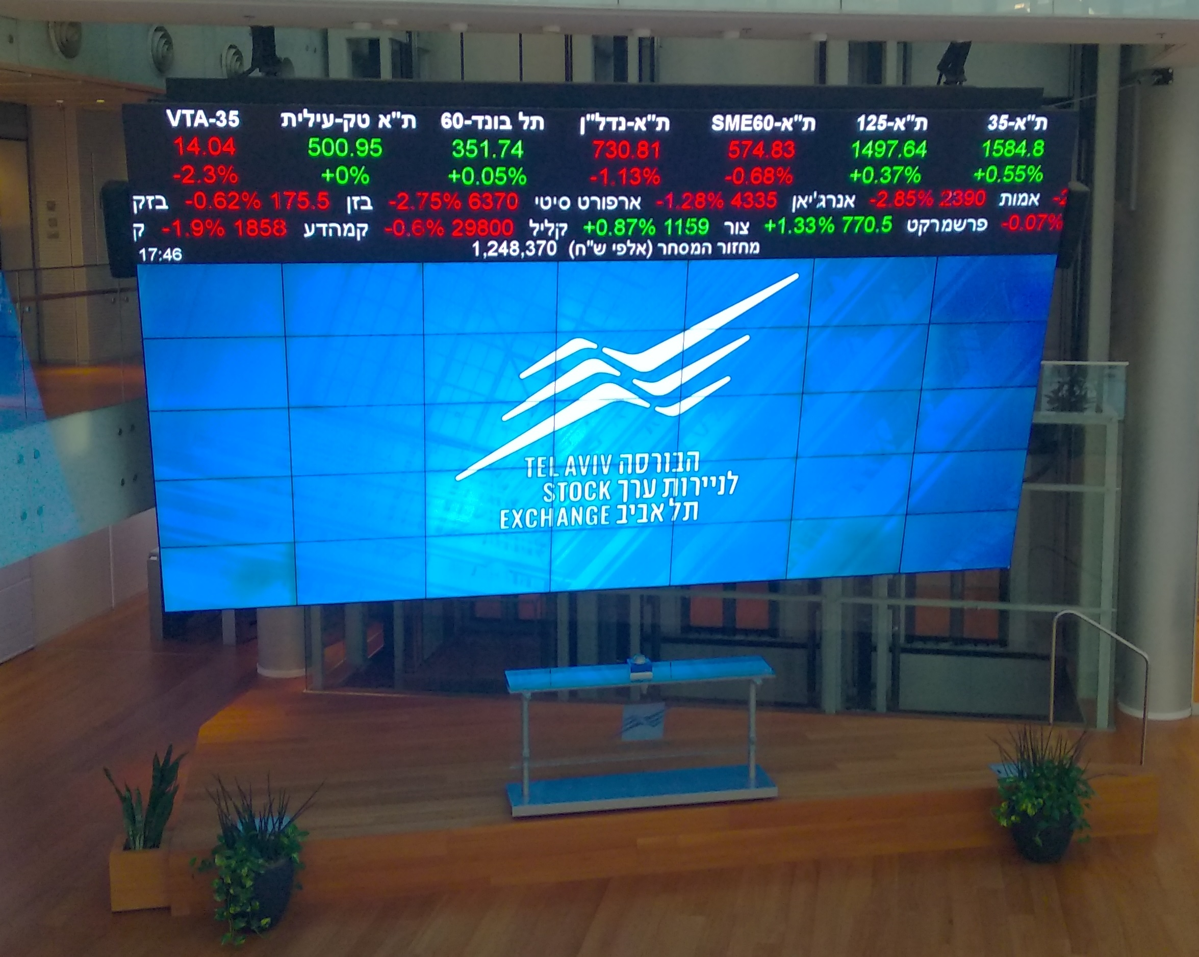 מדדים ושערי ניירות ערך מוצגים במהלך המסחר בלובי הבורסה לניירות ערך בתל אביב